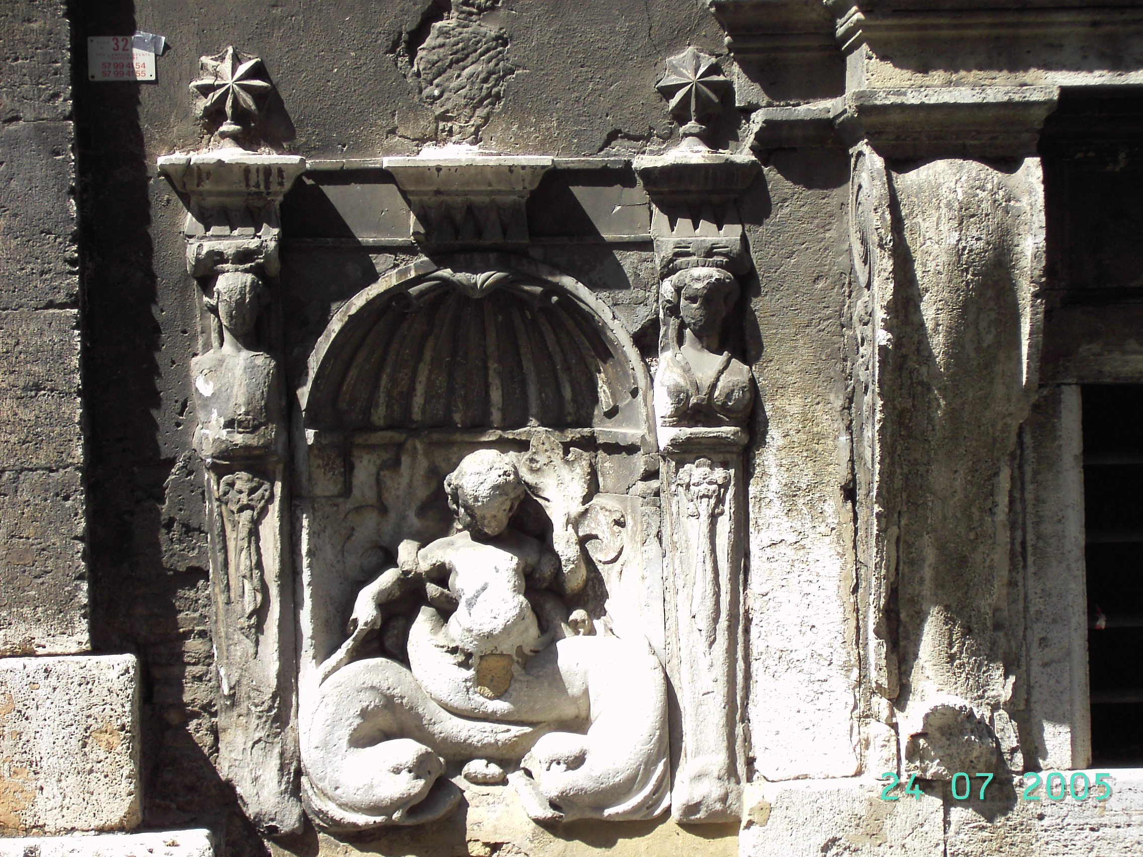 Roma, via Giulia - fontanella di Palazzo Sacchetti